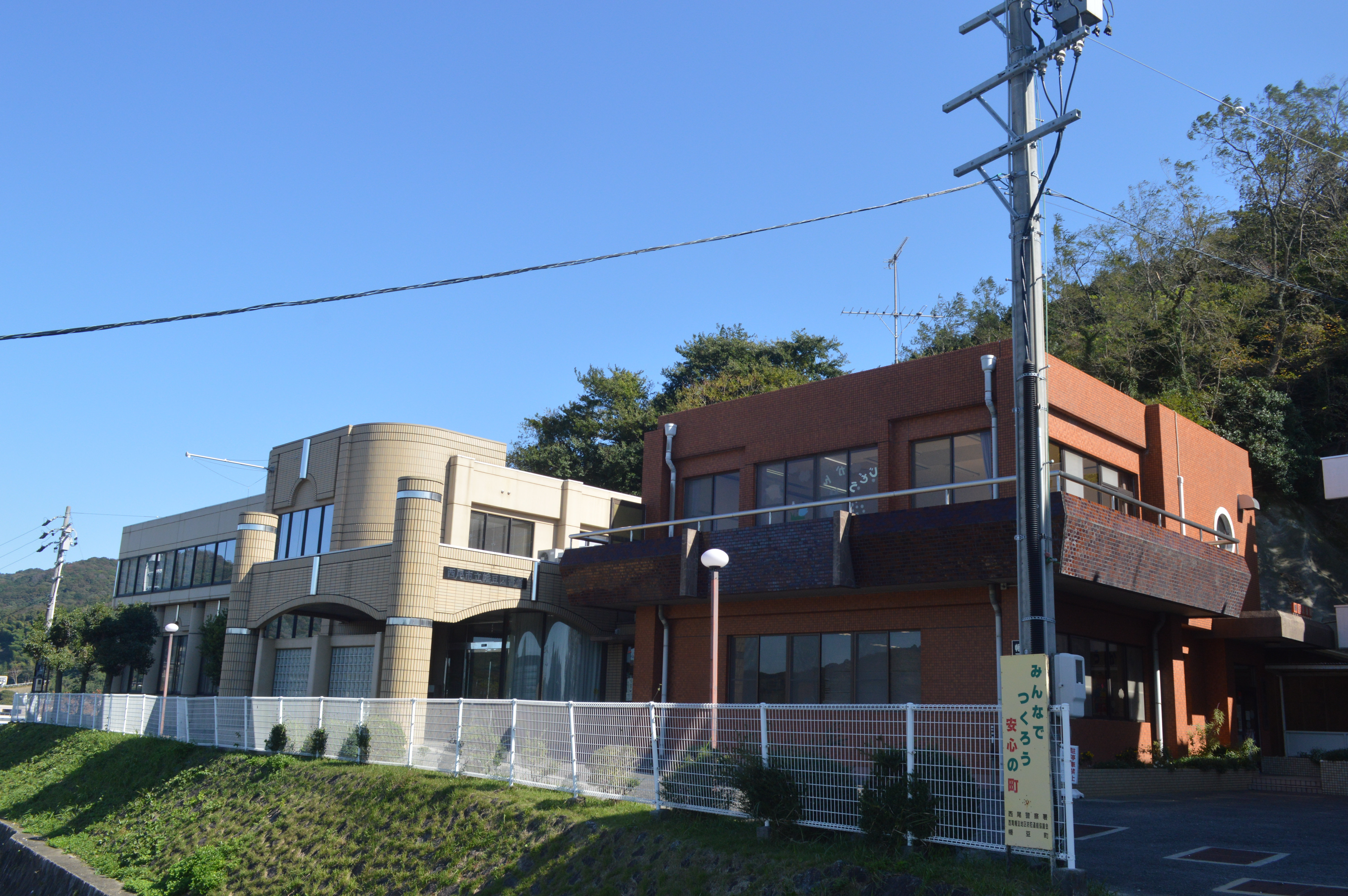 愛知県西尾市の西尾市立幡豆図書館（左側の薄茶色）と幡豆児童館（右側の濃茶色）。